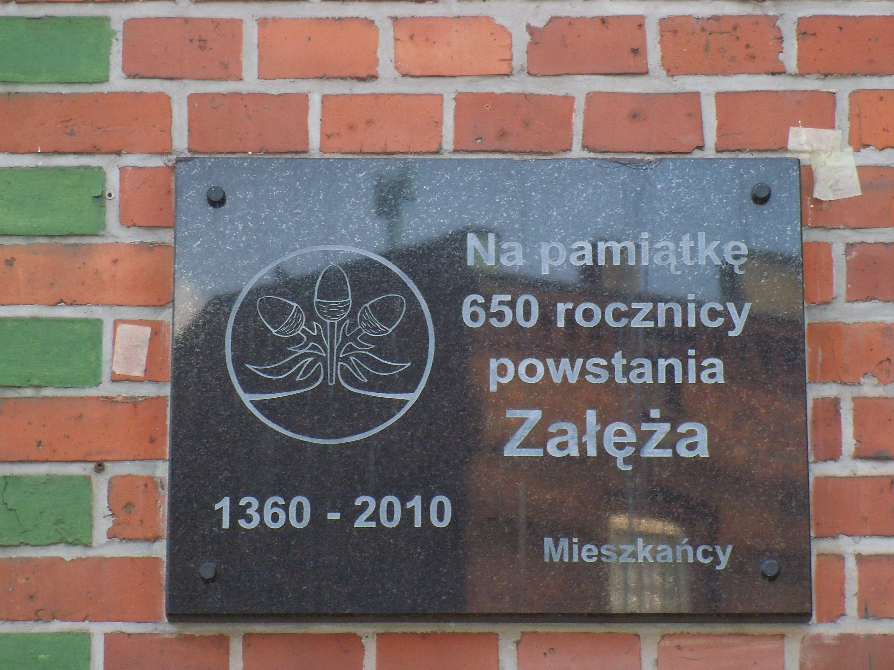 Tablica pamiątkowa na fasadzie budynku przy ulicy Gliwickiej 102 w Katowicach